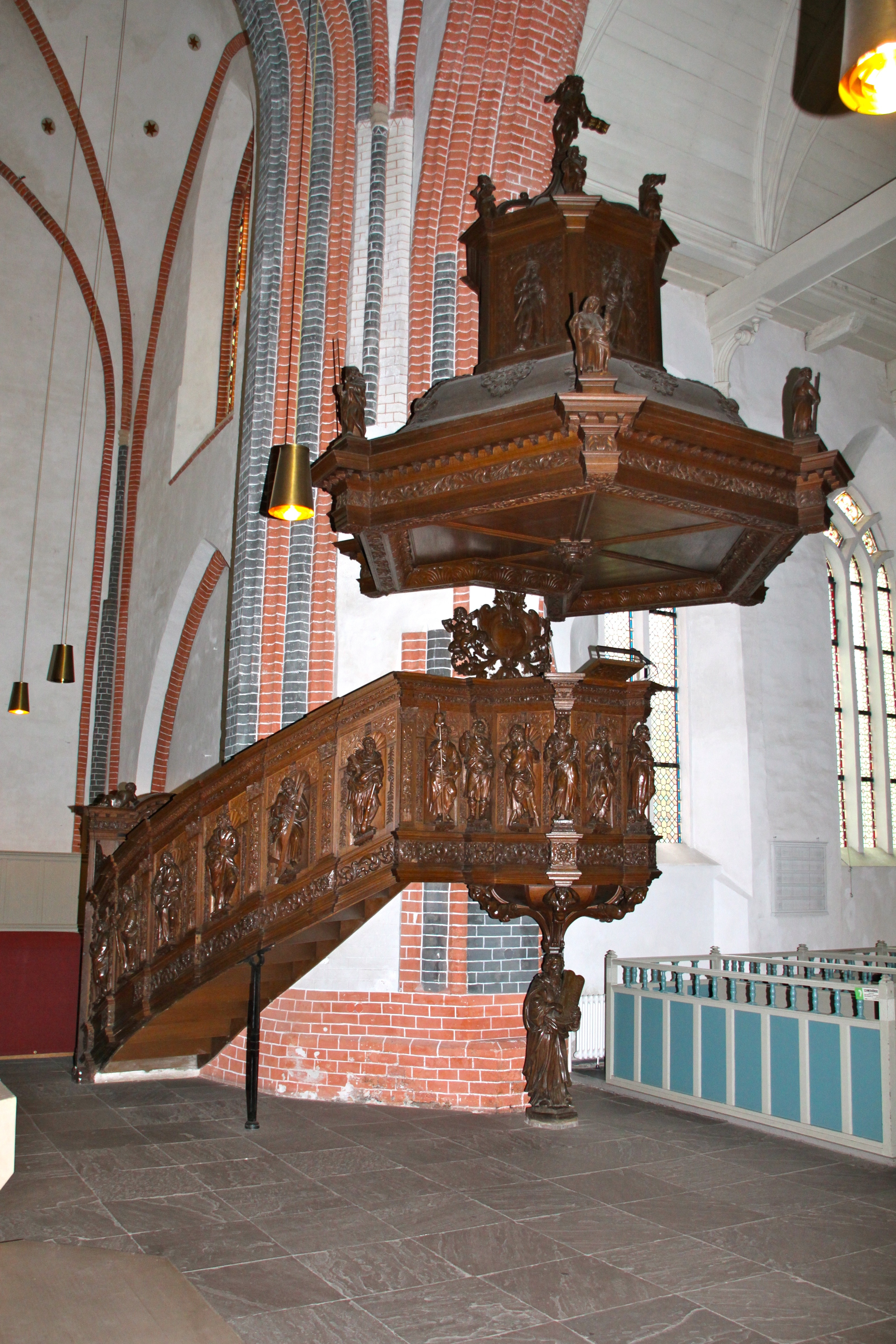 Kanzel der Ludgerikirche